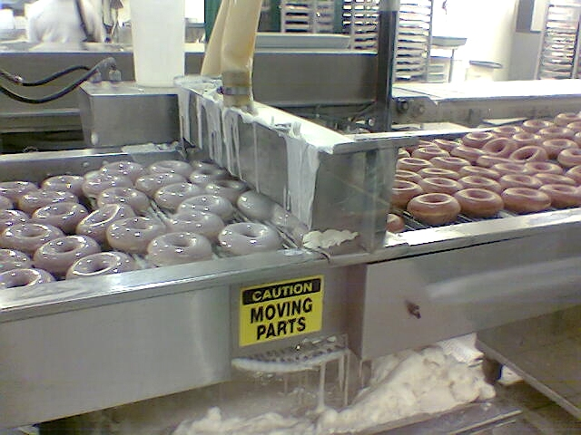 Maschinelles Überziehen von Donuts mit Glasur auf Zuckerbasis; hier in einer Filiale der US-amerikanischen Schnellrestaurant-Kette Krispy Kreme in Winter Park in Florida, USA.